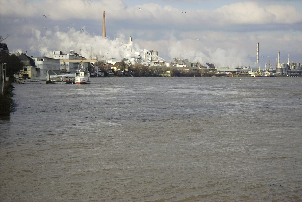 Wessling, Rheinufer mit chemischer Industrie